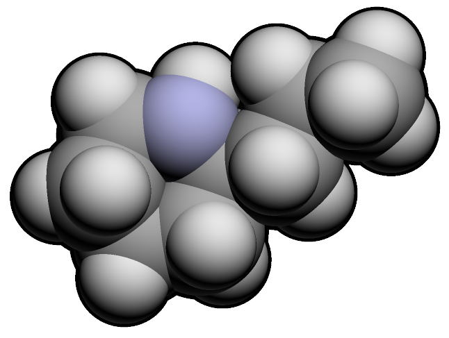 Molecular spacefill of Coniine